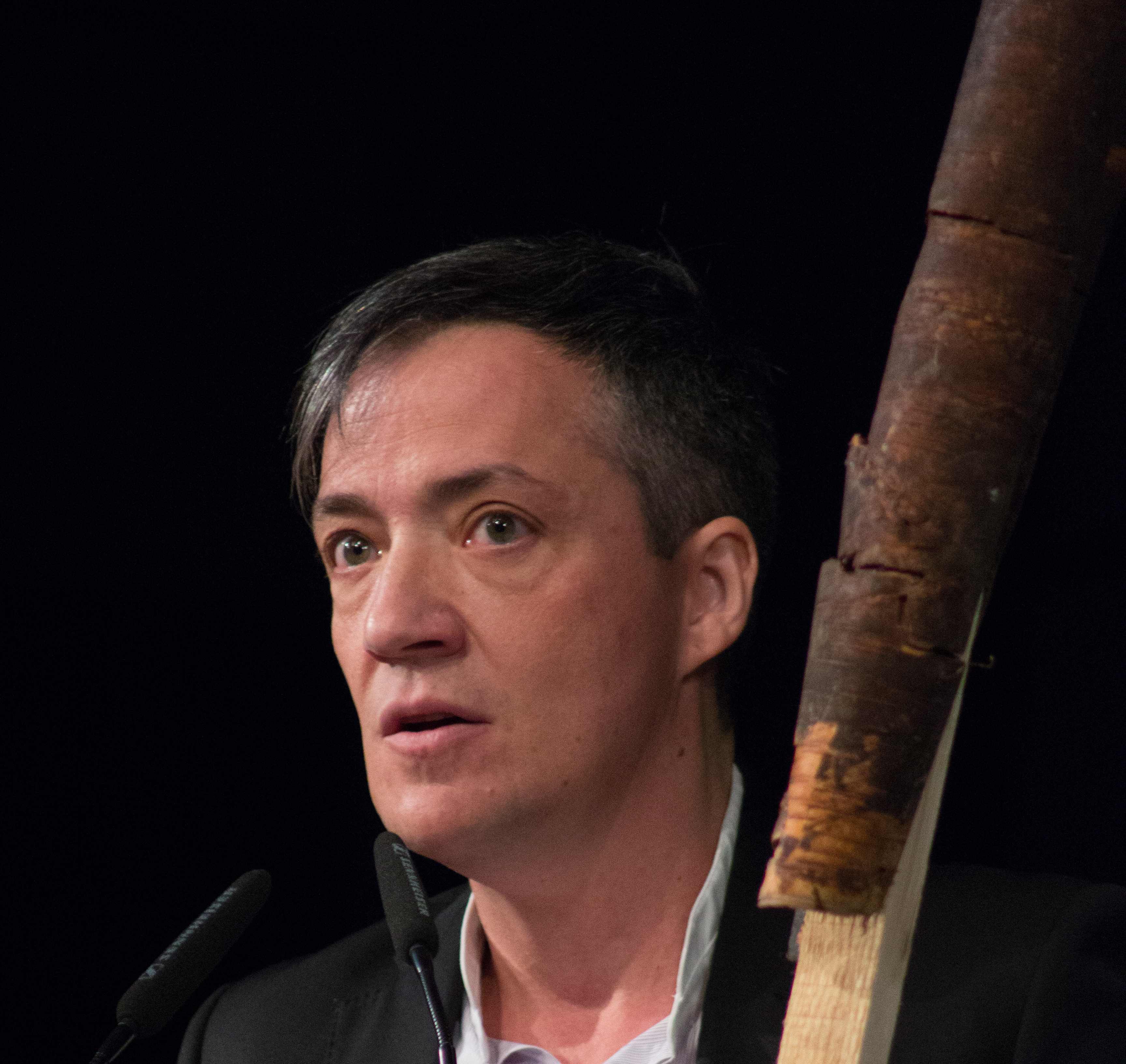 Documenta 14 in Kassel: Paul B. Preciado im Rahmen der Eröffnungskonferenz der Documenta 14 am 7. Juni 2017 in Kassel